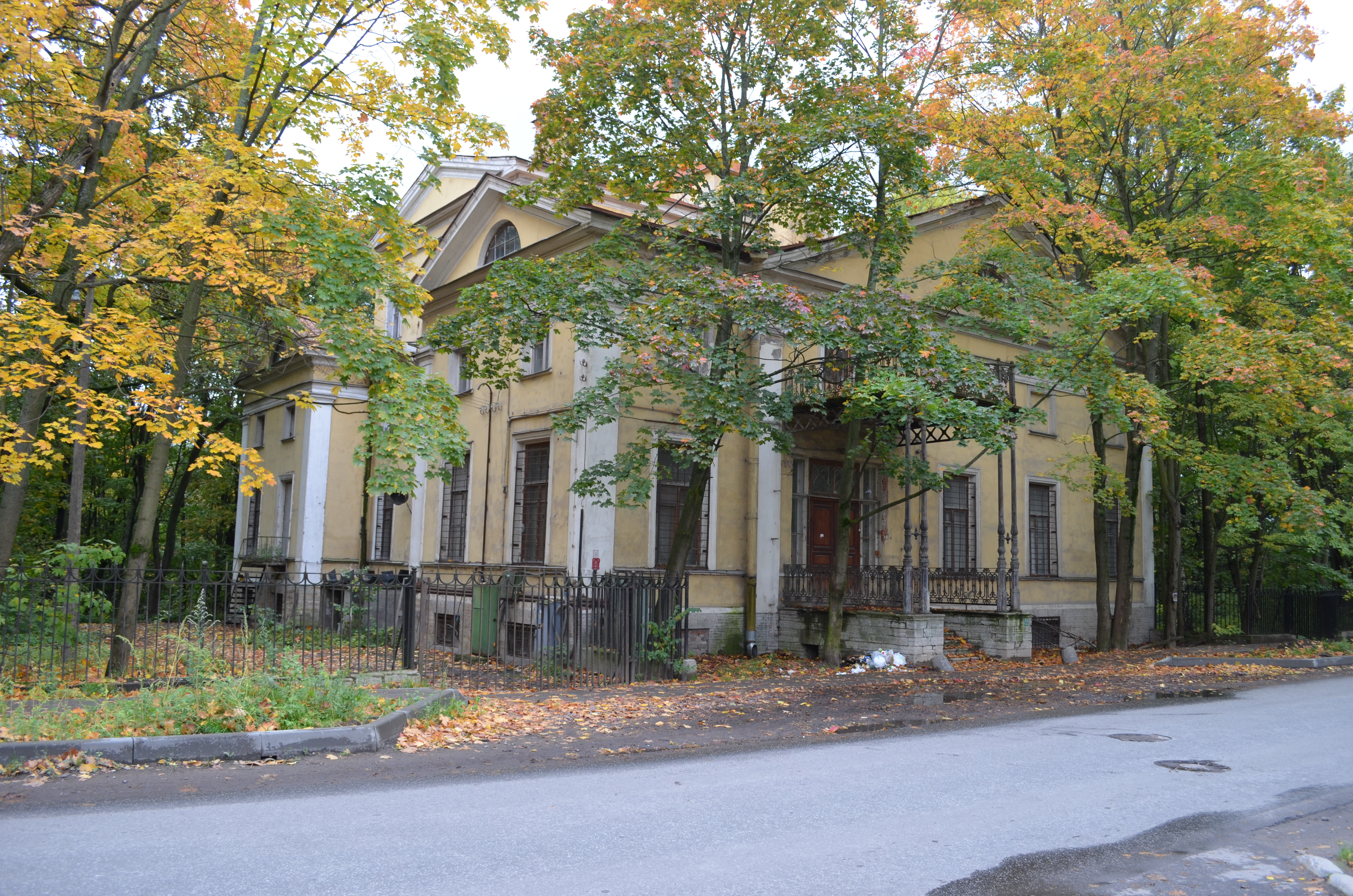 Вид с северо-западной стороны. Здание в запущенном состоянии, крыша крыльца с большой дырой. Подойти к зданию со всех сторон нельзя, ворота парковой ограды на замке.